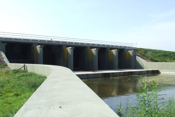 Een door Rijkswaterstaat gerestaureerd inlaatwerk wat onderdeel was van de Ijsellinie.